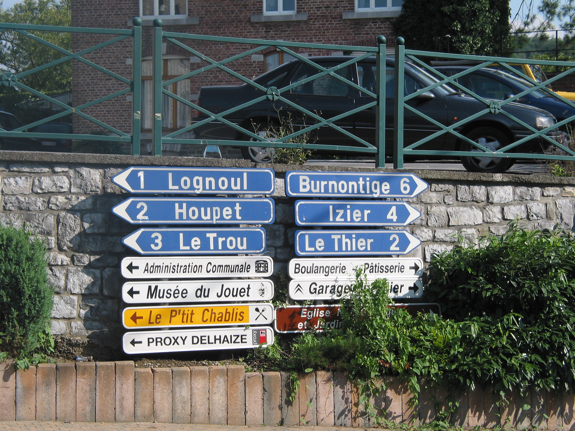 Panneaux indicateurs à Ferrières (Liège) (Belgique).